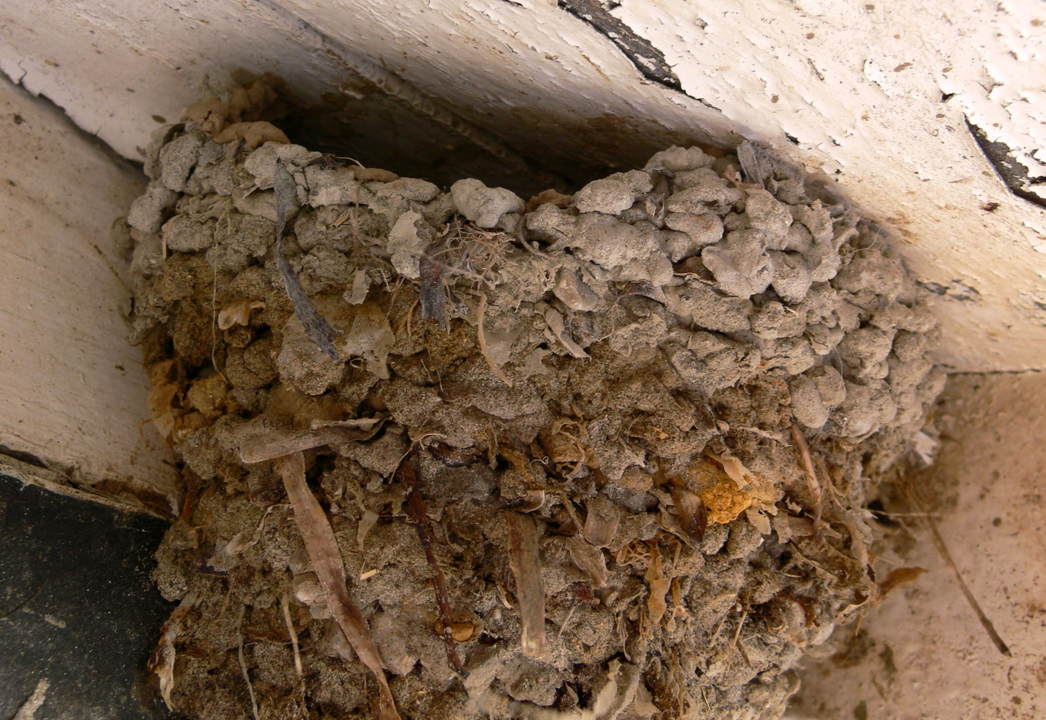 Hirondelle de fenêtre (Delichon urbica). Photo prise à Morgat, commune de Crozon, en juillet 2006, en bord de mer à Morgat (Bretagne, France, Europe) et diffusée avec son autorisation sous licence Il s’agit d’une petite colonie de quelques dizaines de couples qui avait régressé puis disparu dans les années 80-90, remplacée par des martinets. Cette colonie installée au 4ème étage d’un ancien hôtel semble se reconstituer depuis les années 2000. Les nids sont construits face au soleil levant, constitués de sables et de morceaux de plantes marines (posidonies) prélevés sur la plage proche. Quelques hirondelles rustiques nichent au milieu des hirondelles de fenêtre.